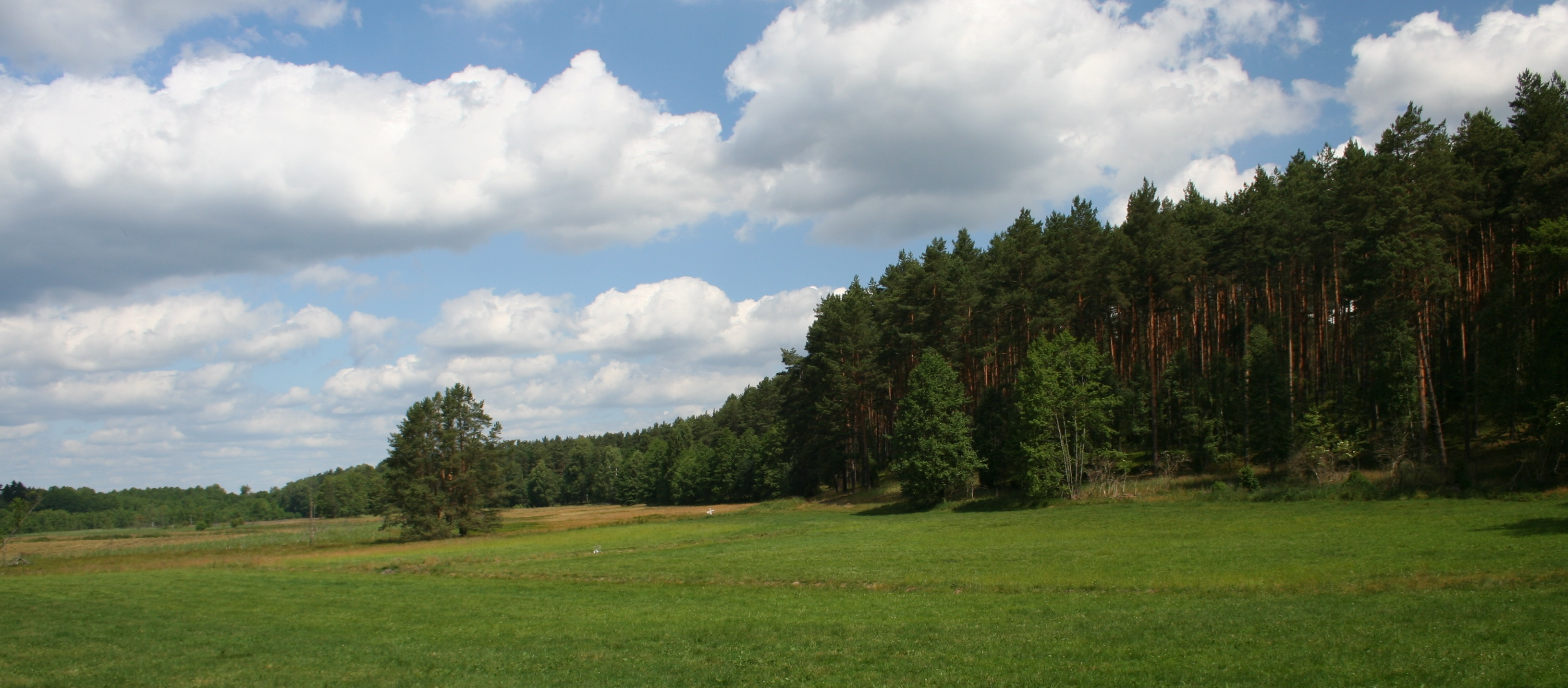 Dolina Sobińskiej Strugi